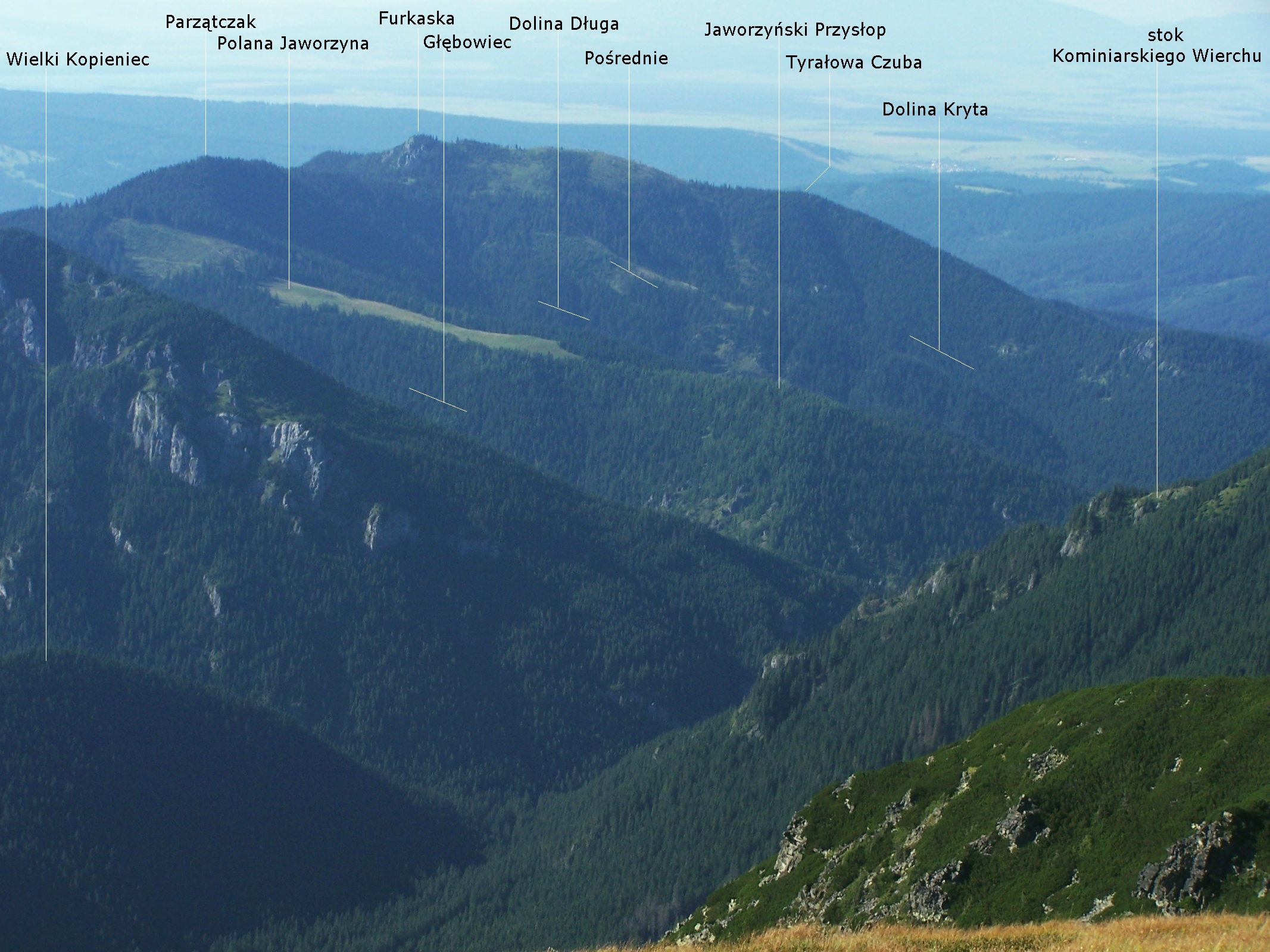 Widok z Suchego Wierchu Ornaczańskiego na otoczenie Doliny Chochołowskiej